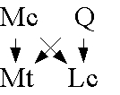 Problème synoptique: hypothèse des deux sources Auteur: jyp Catégorie:Schémas